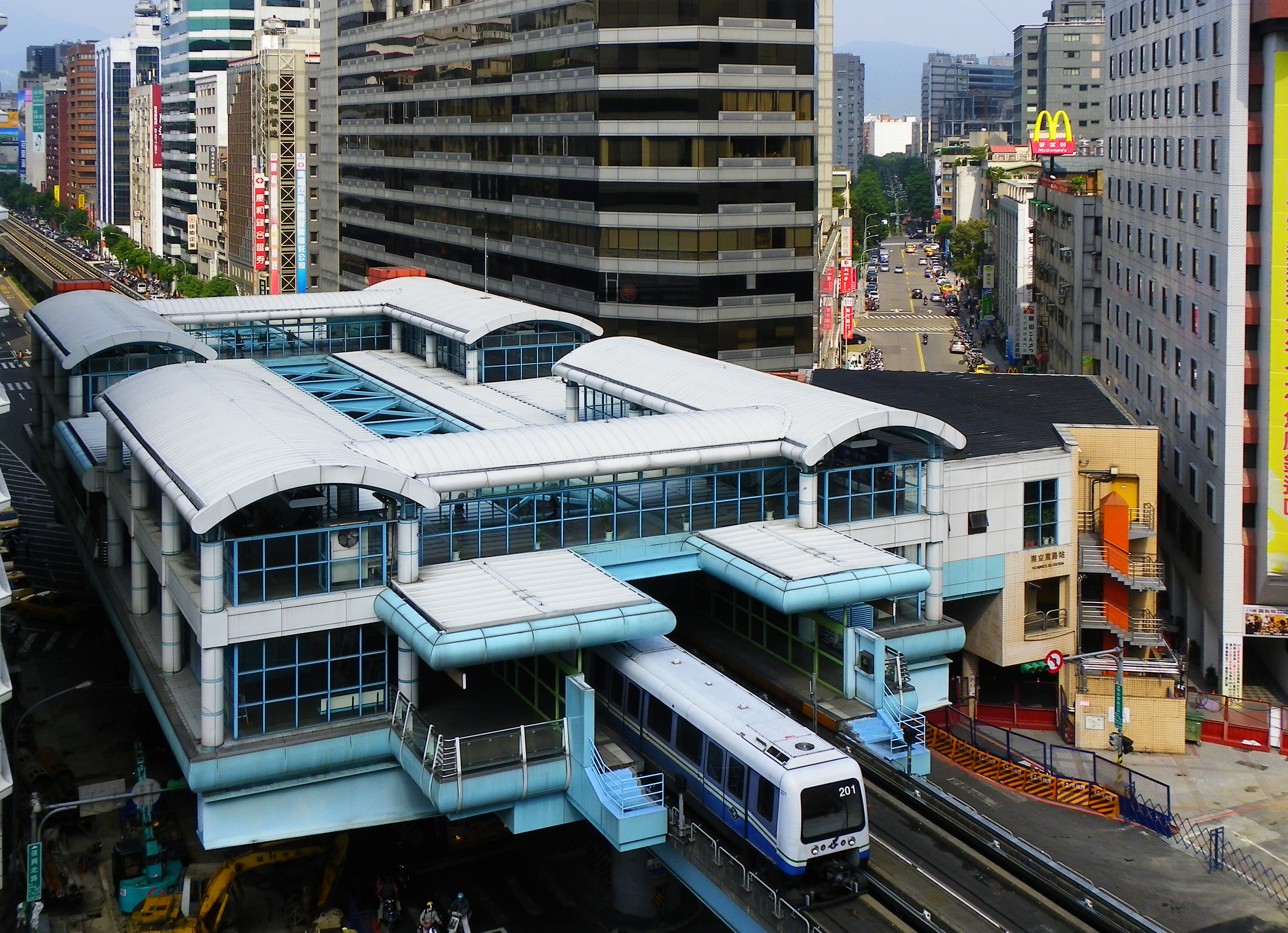 台北捷運文湖線南京復興駅（旧南京東路駅）。中文（台灣）: 台北捷運文湖線南京復興站（原南京東路站）。